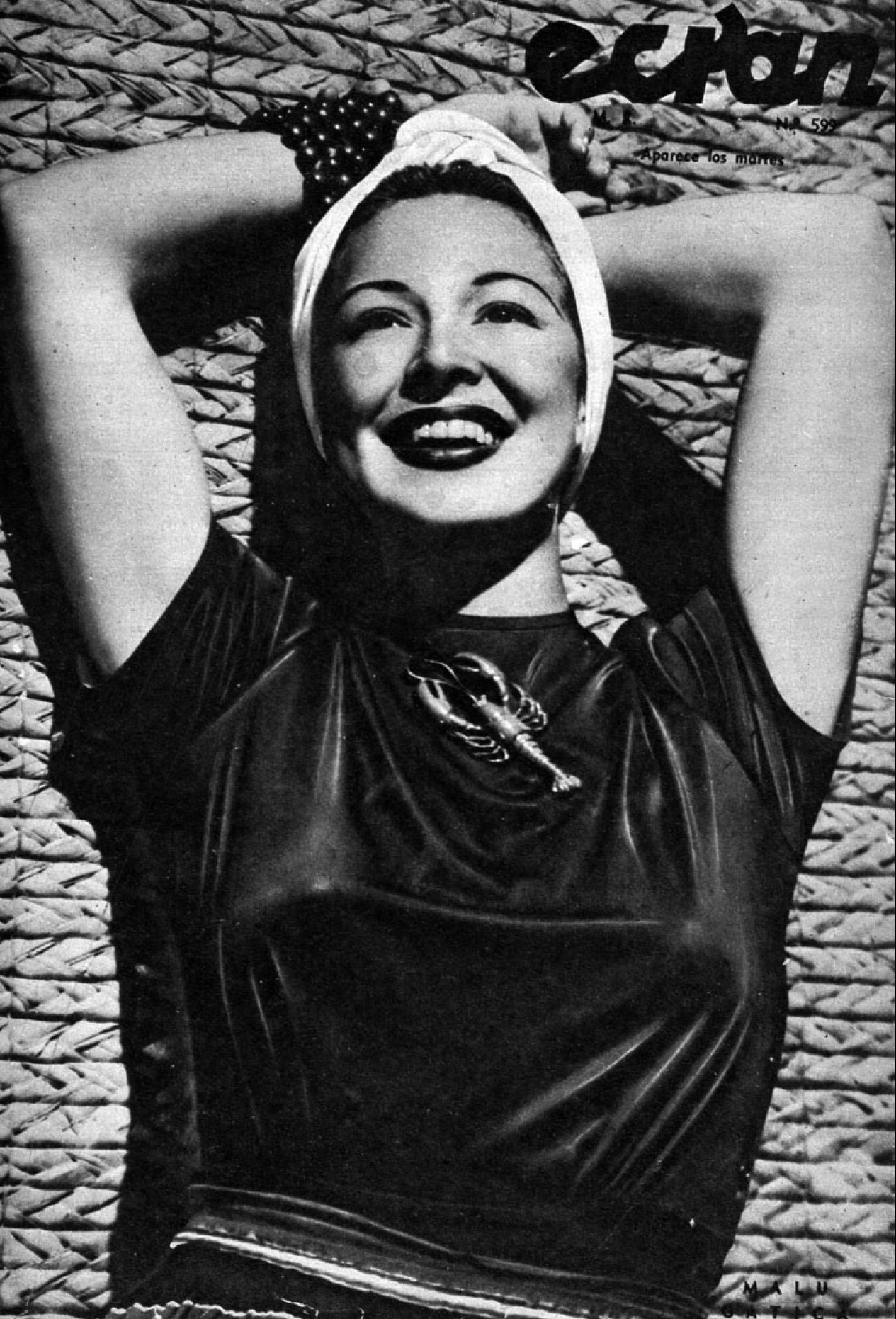 Malú Gatica en la portada de la Revista chilena Ecran N°599 de 1942.